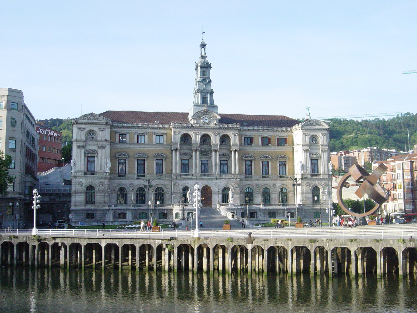 Ayuntamiento de Bilbao (Duly)